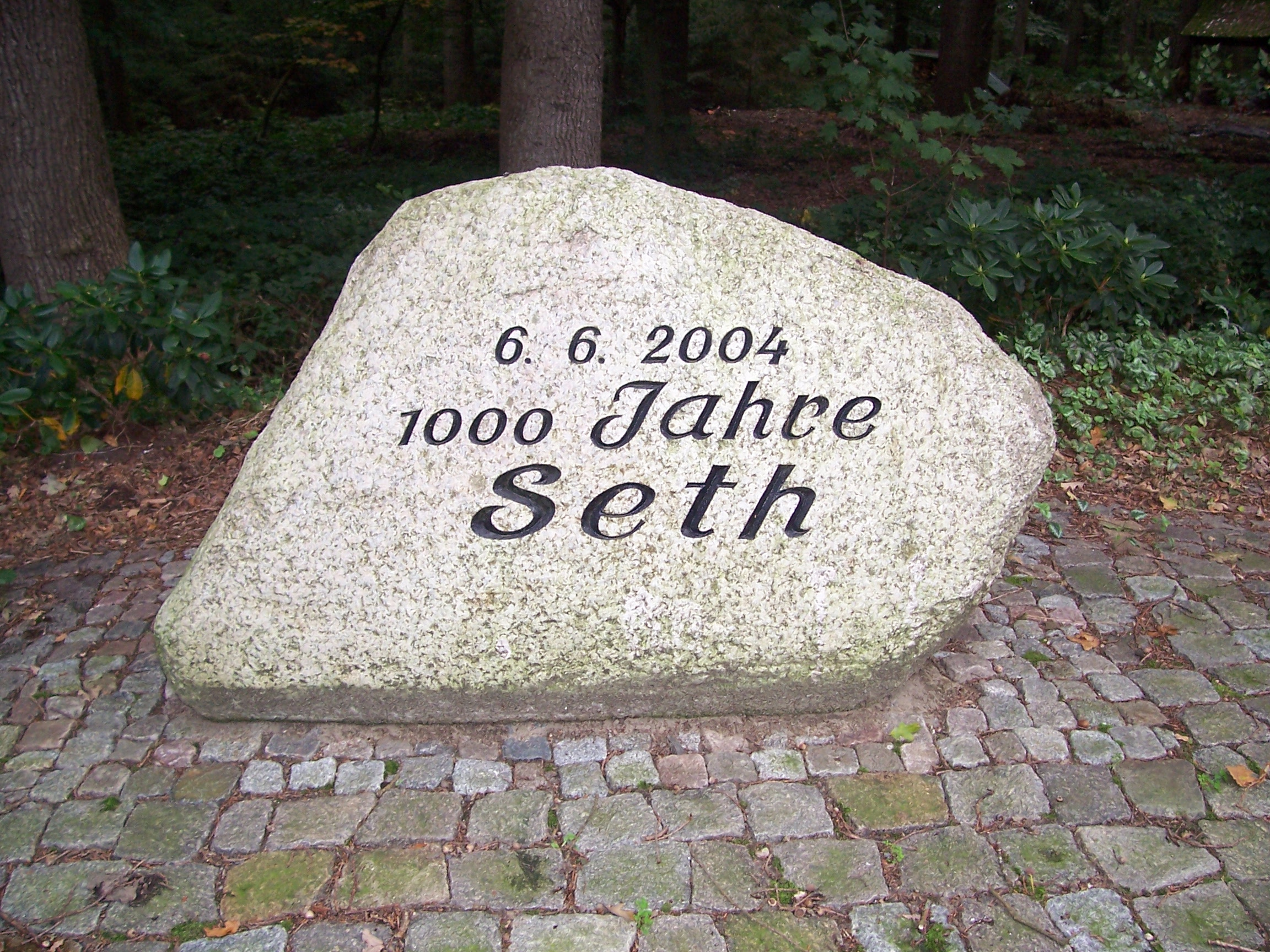 Jubiläumssteen 1000 Johr Seth in Seth bi Loomst